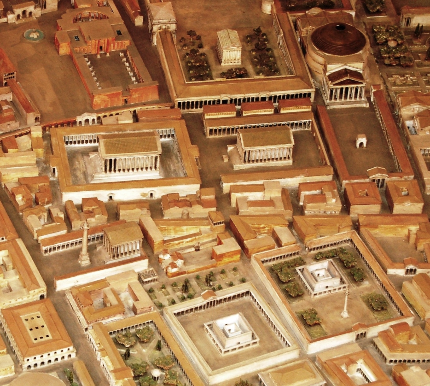 Area del Pantheon, Tempio di Adriano, Tempio e Colonna di Marco Aurelio - plastico di Italo Gismondi presso il Museo della Civiltà Romana (EUR)